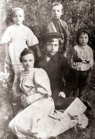 Настаўнік Мінскай прыватнай гандлёвай школы Я.Маўр з жонкай Варварай Фёдараўнай і дзецьмі [1910 г.], мястэчка Турэц Карэліцкага раёна